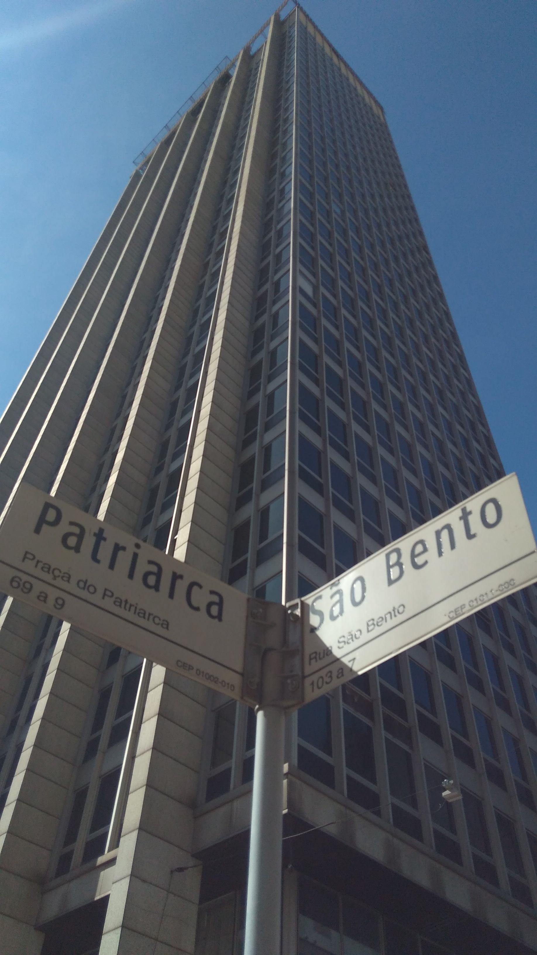 Placa da rua Direita, logradouro do Edifício